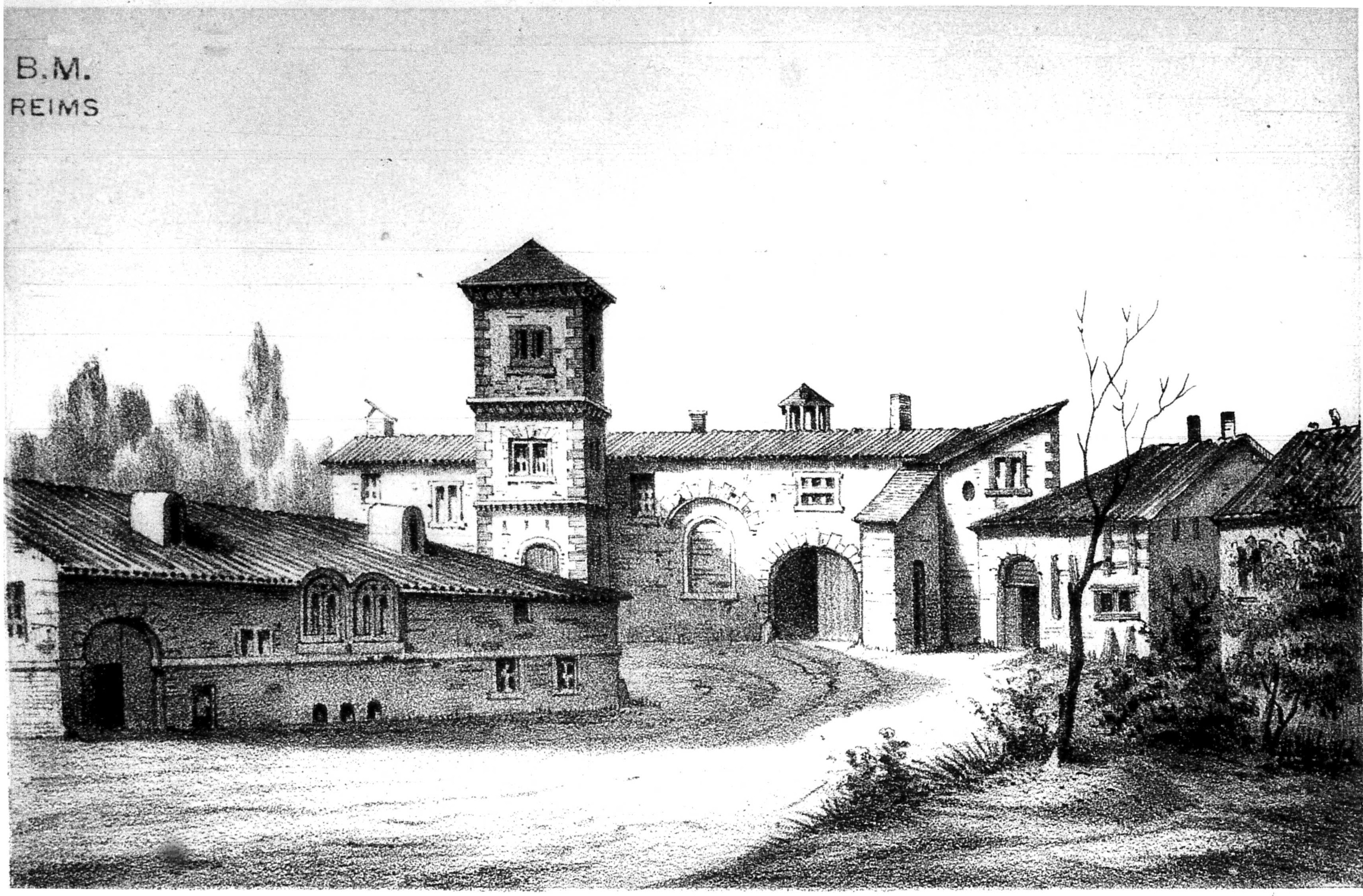 gravure de Chalons.